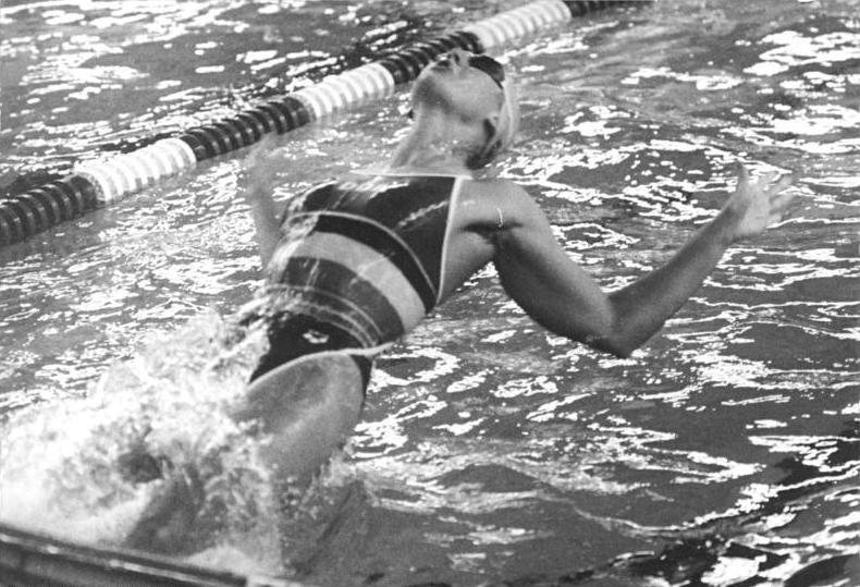 Kathrin Zimmermann ADN-ZB Hirndorf 18.6.87 Erfurt: Schwimmen- DDR-Meisterschaften- Neue Titelträgerin über 100 Meter Rücken der Damen wurde mit einer Zeit von 1:02,49 Minuten Kathrin Zimmermann vom SC Karl-Marx-Stadt.